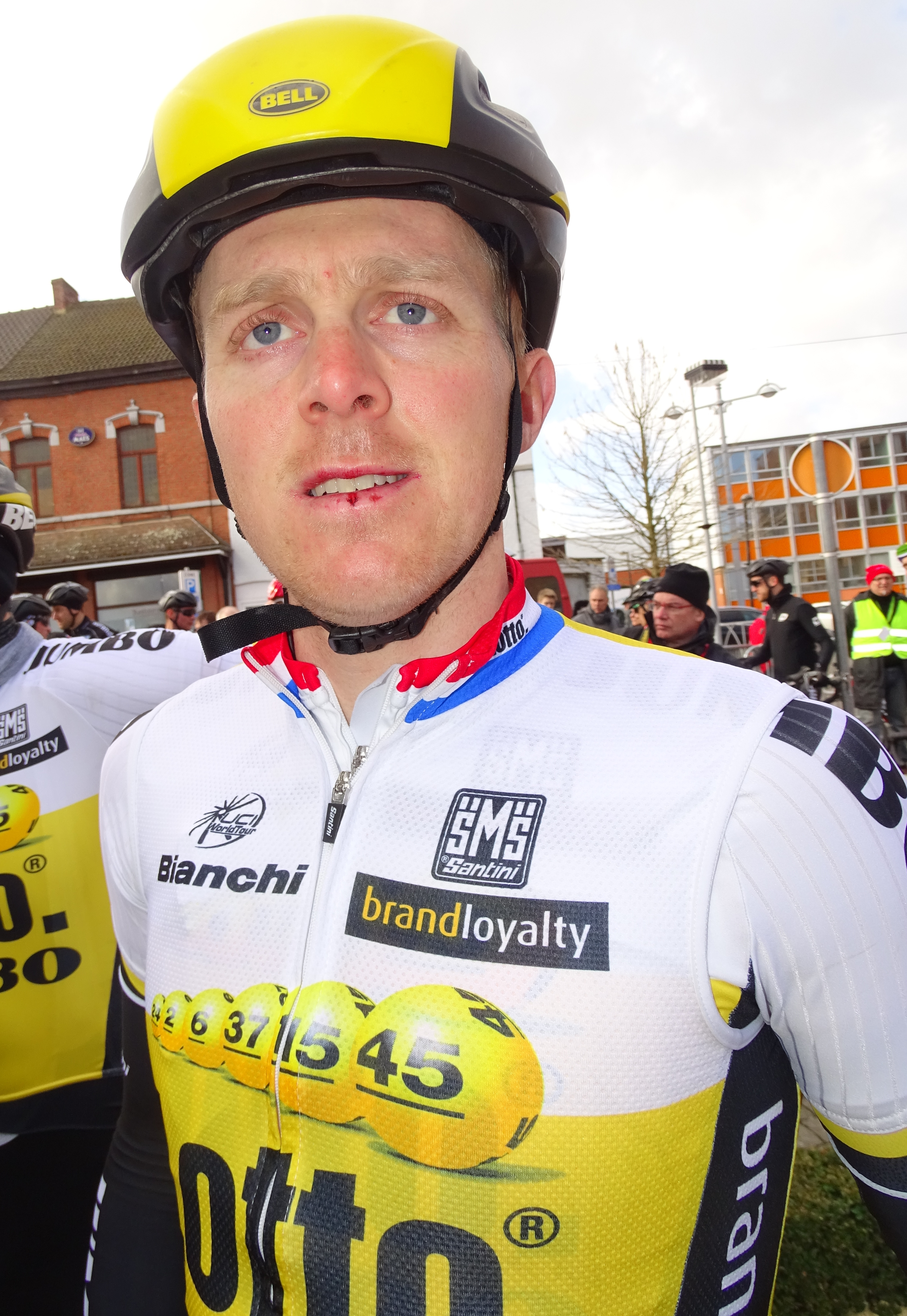 Reportage réalisé le mercredi 2 mars à l'occasion du départ du Samyn des Dames 2016 et du Samyn 2016 à Quaregnon, Belgique.